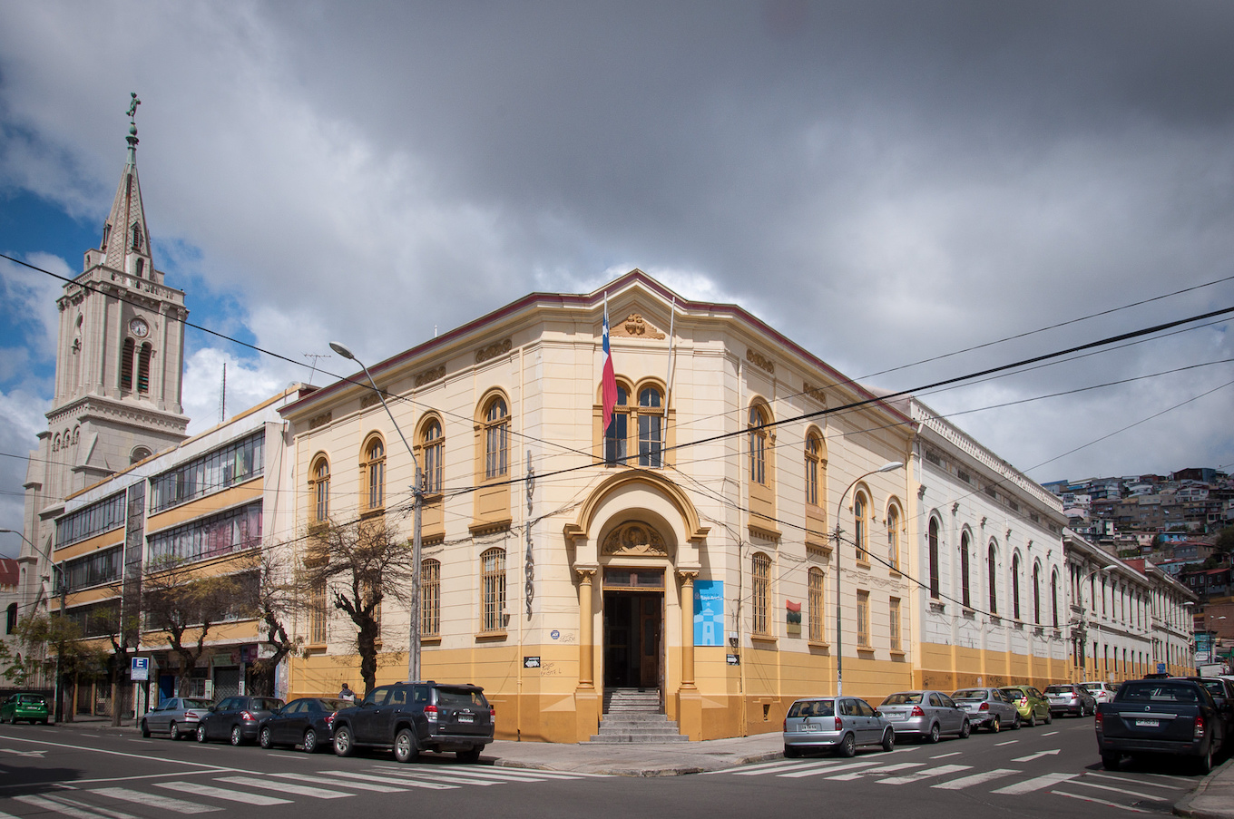 Independencia UPLA